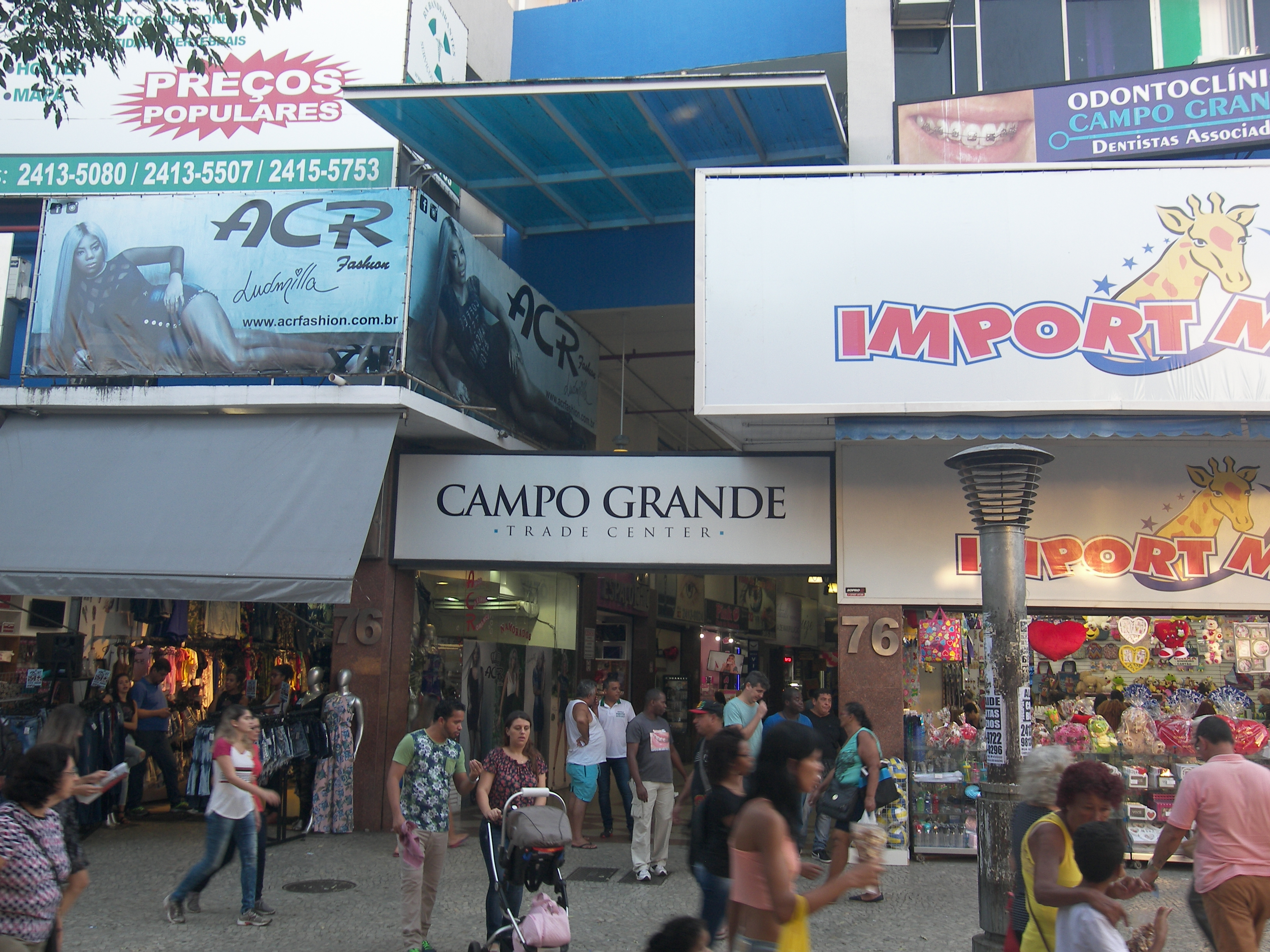 Edifício Campo Grande Trade Center, localizado na Rua Coronel Agostinho, Campo Grande, Rio de Janeiro.